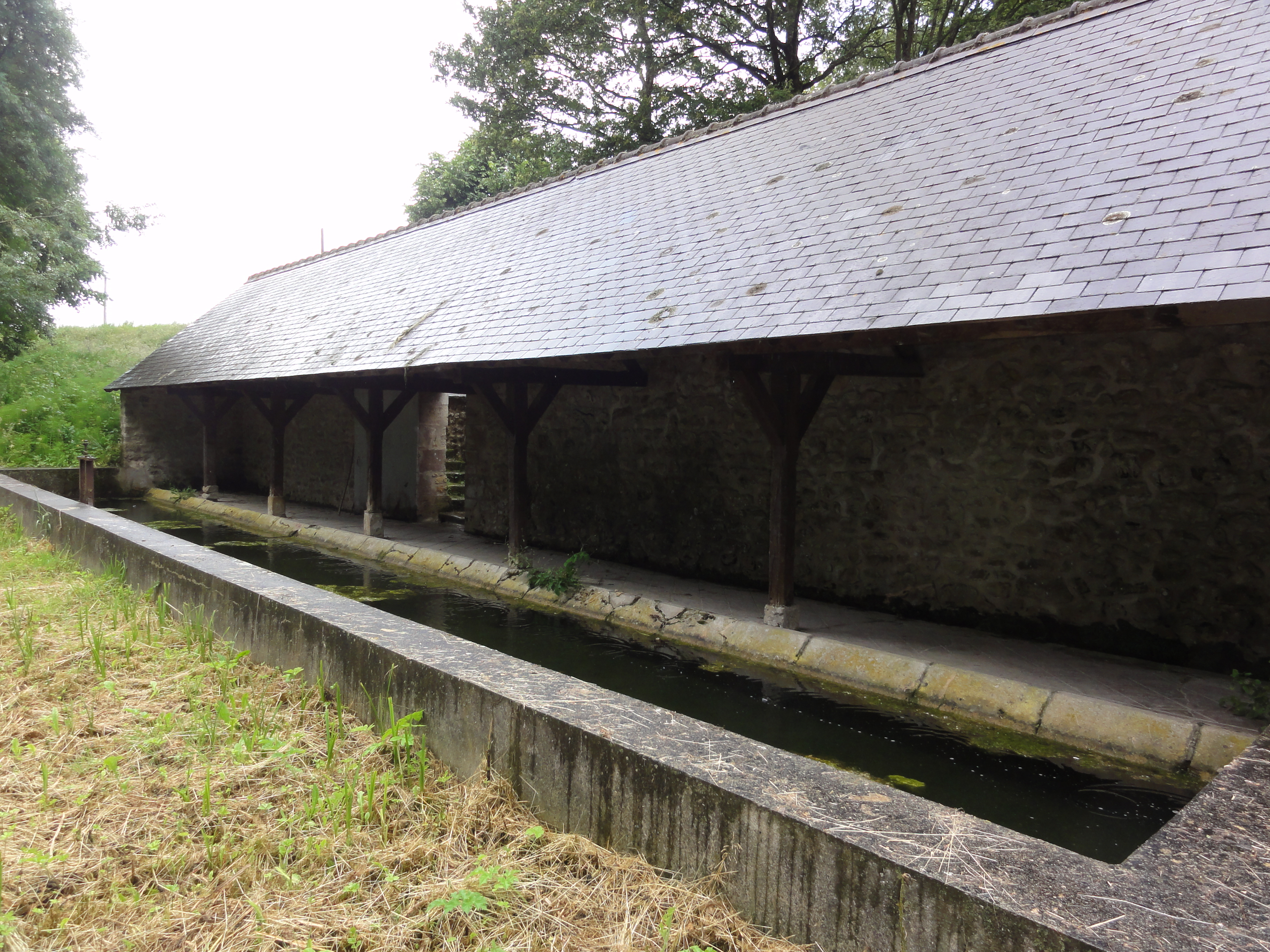 Sainte-Catherine-de-Fierbois (Indre-et-Loire) Lavoir